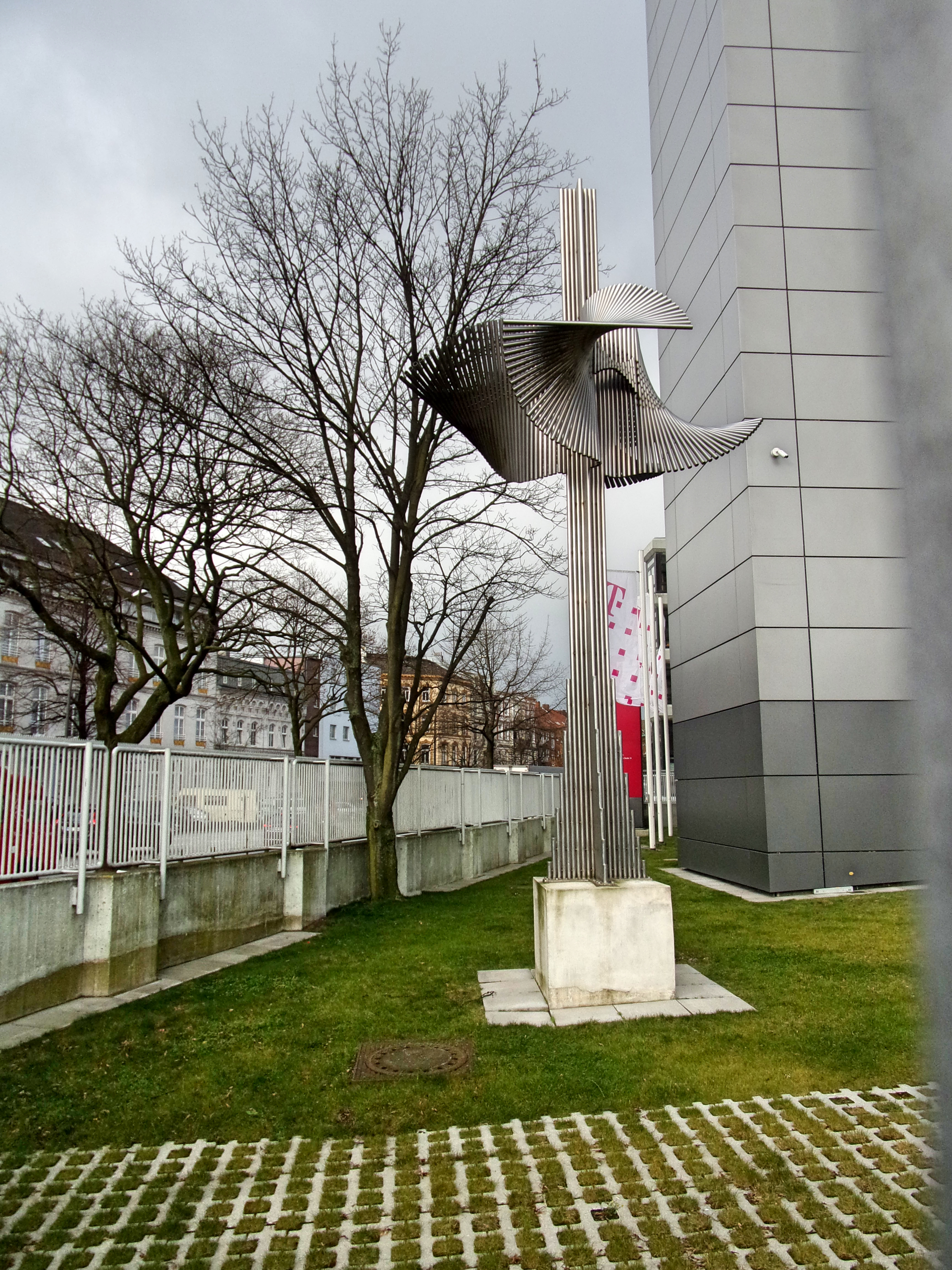 Skulptur Flügelturm von Karl Heinz Engelin aus dem Jahre 1979 am Telekom-Gebäude, Budapester Straße 18.